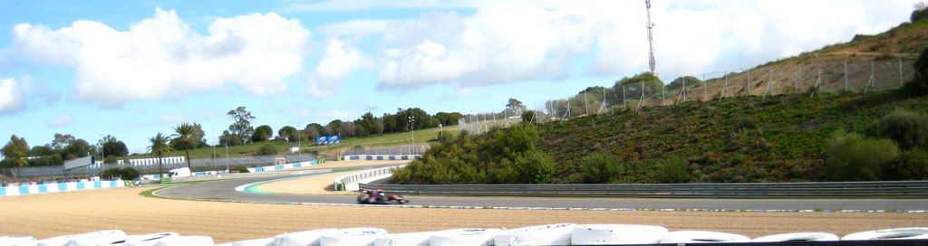 Entrenamientos Oficiales F1 Jeréz, 11 Febrero 2010